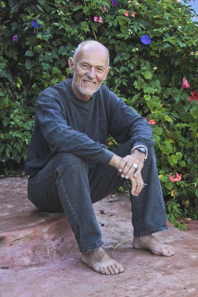 Willi Dolder in Kenia, April 2010